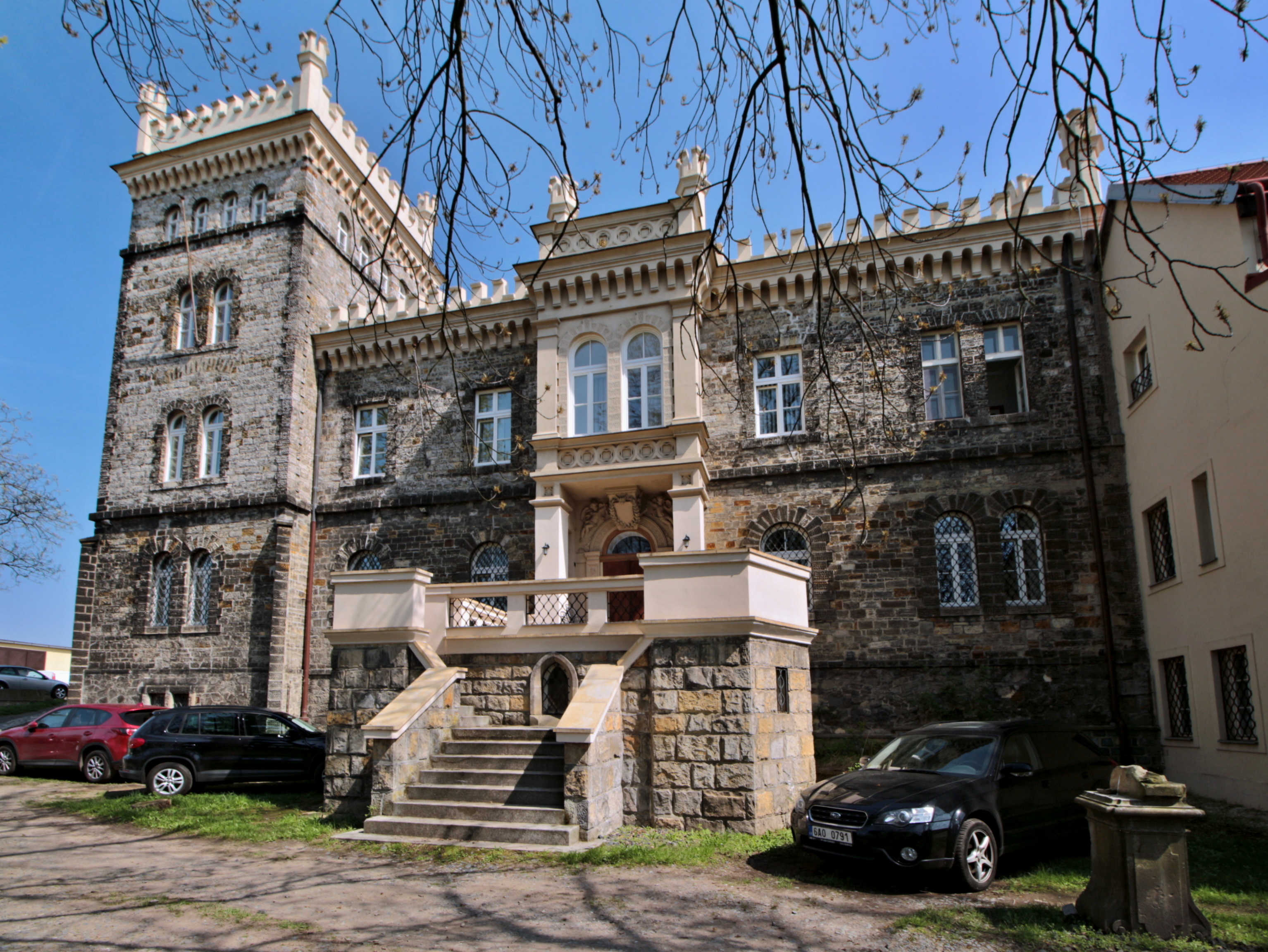 Hloubětínský zámek